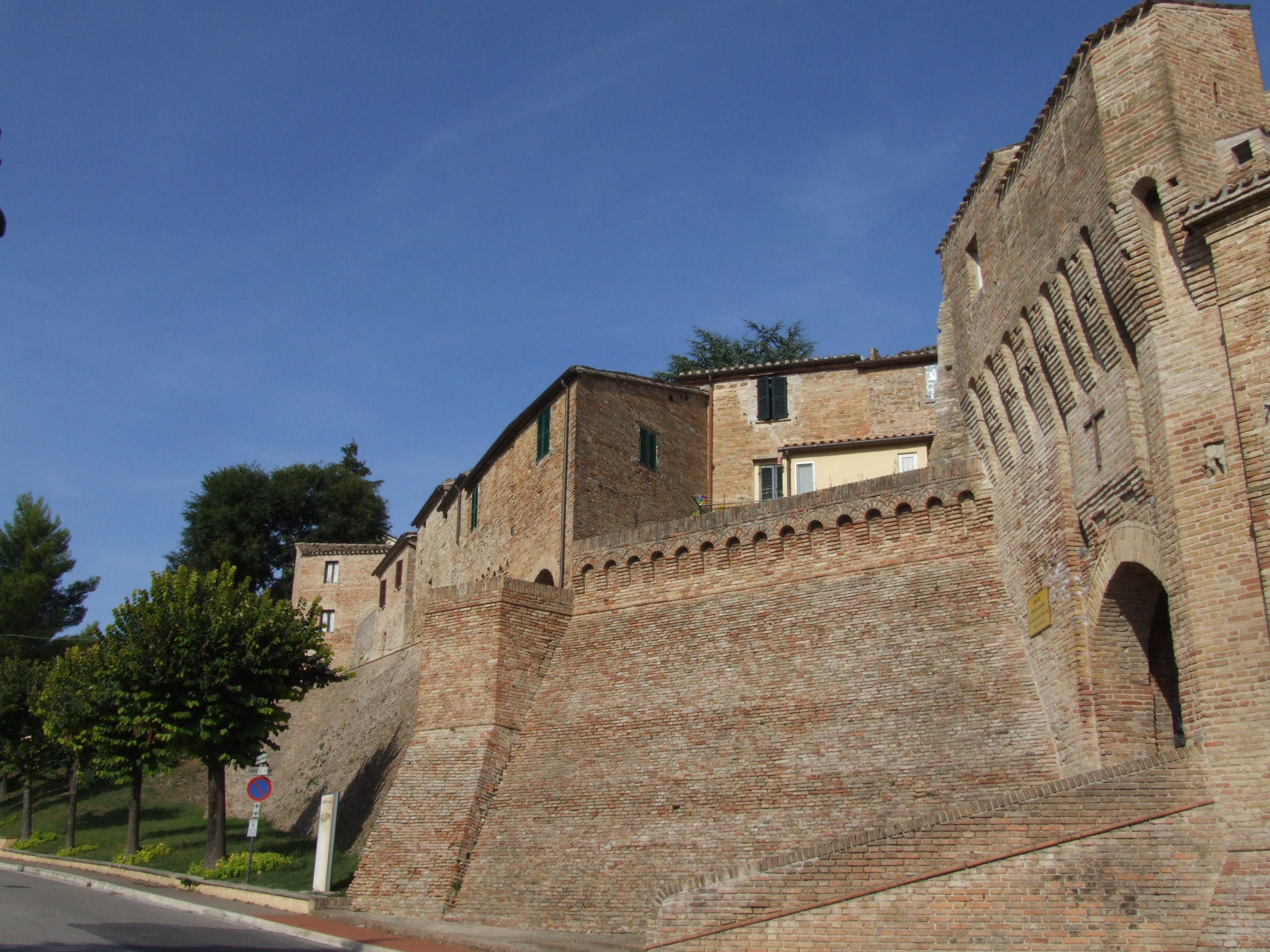 Porta della Croce This is a photo of a monument which is part of cultural heritage of Italy.